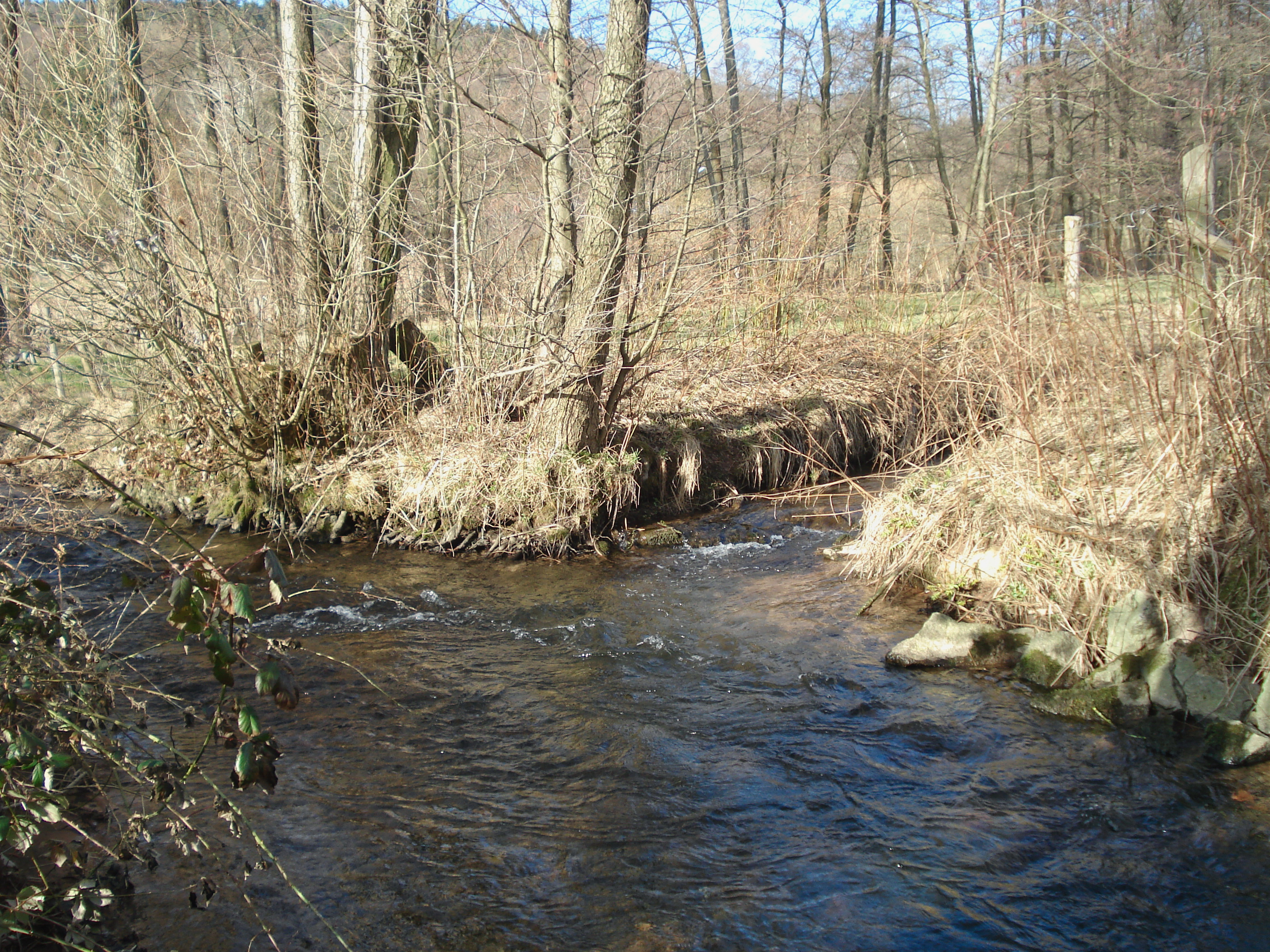 Der Edelbach (rechts) mündet in die Kahl